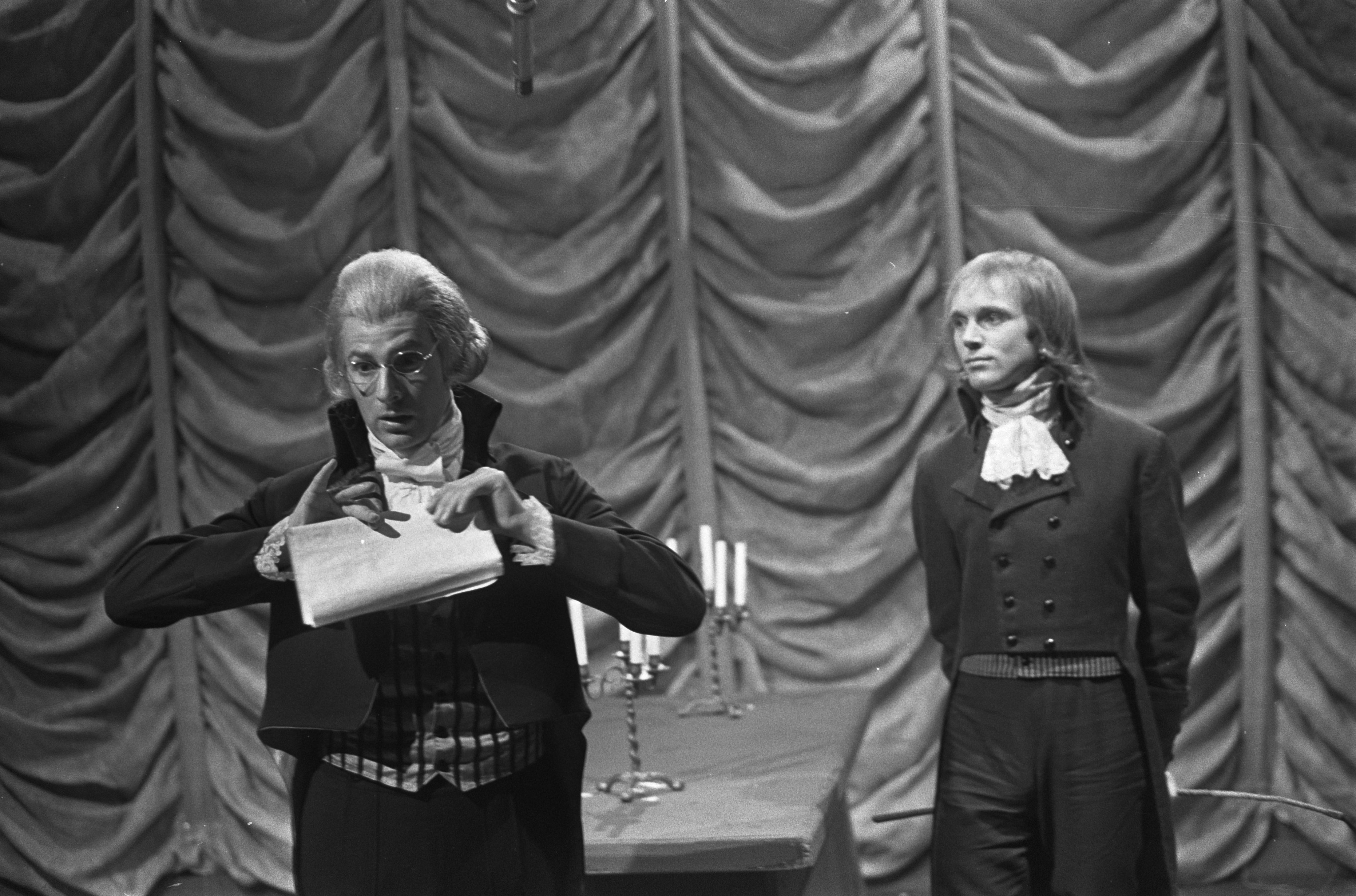 TV-spel "De dood van Danton" van Georg Buchner . Carol Linssen als Robespierre. 18 maart 1970, Nederland